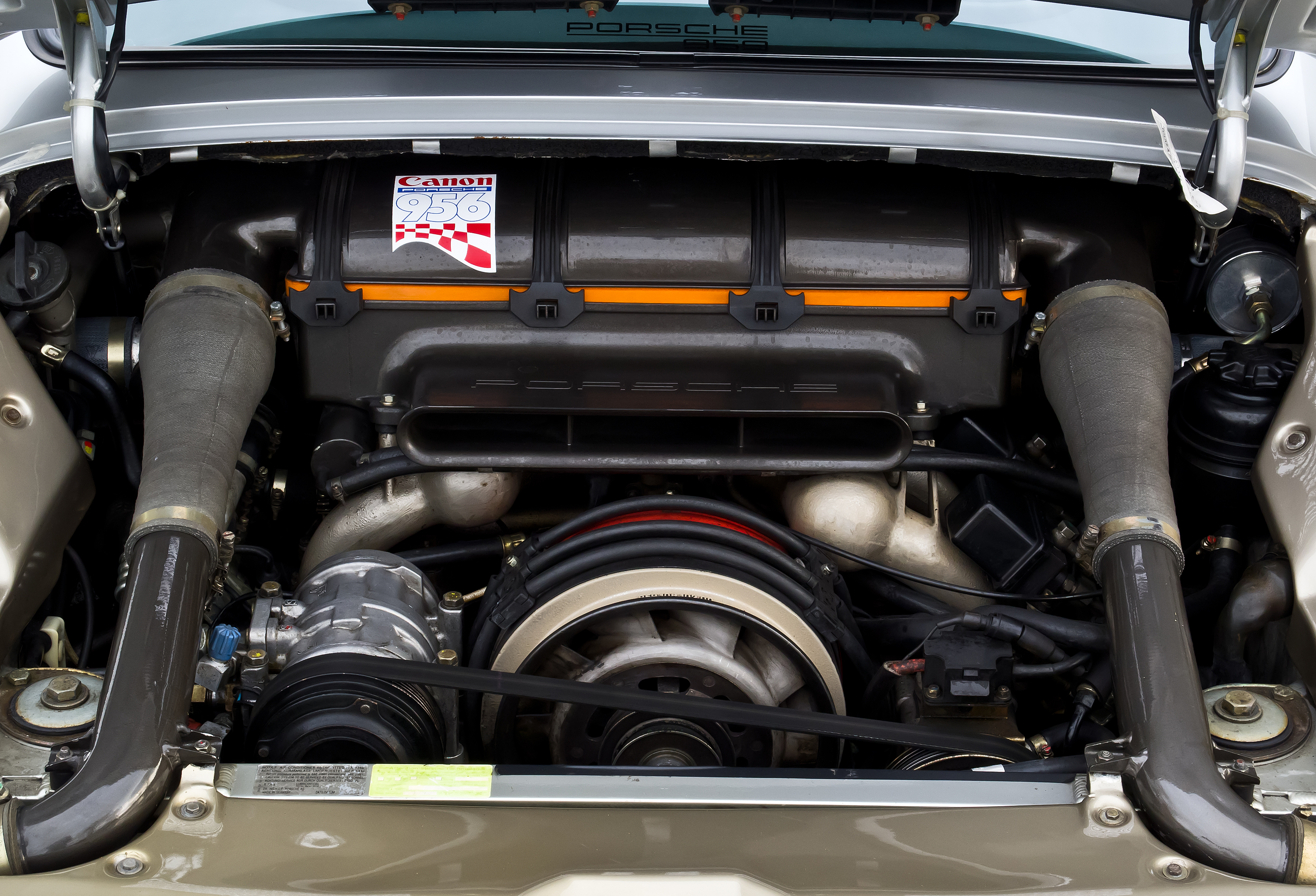 Motor eines Porsche 959.